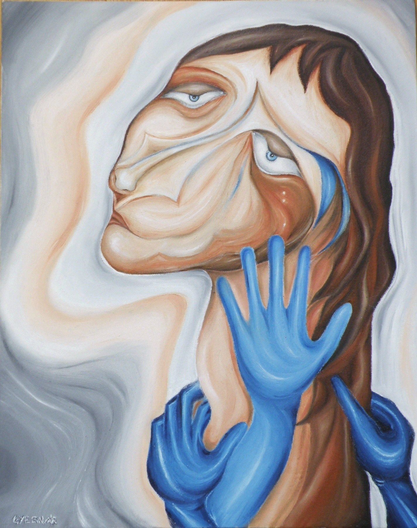 Gyebnár István: Ábrándozó; olajfestmény